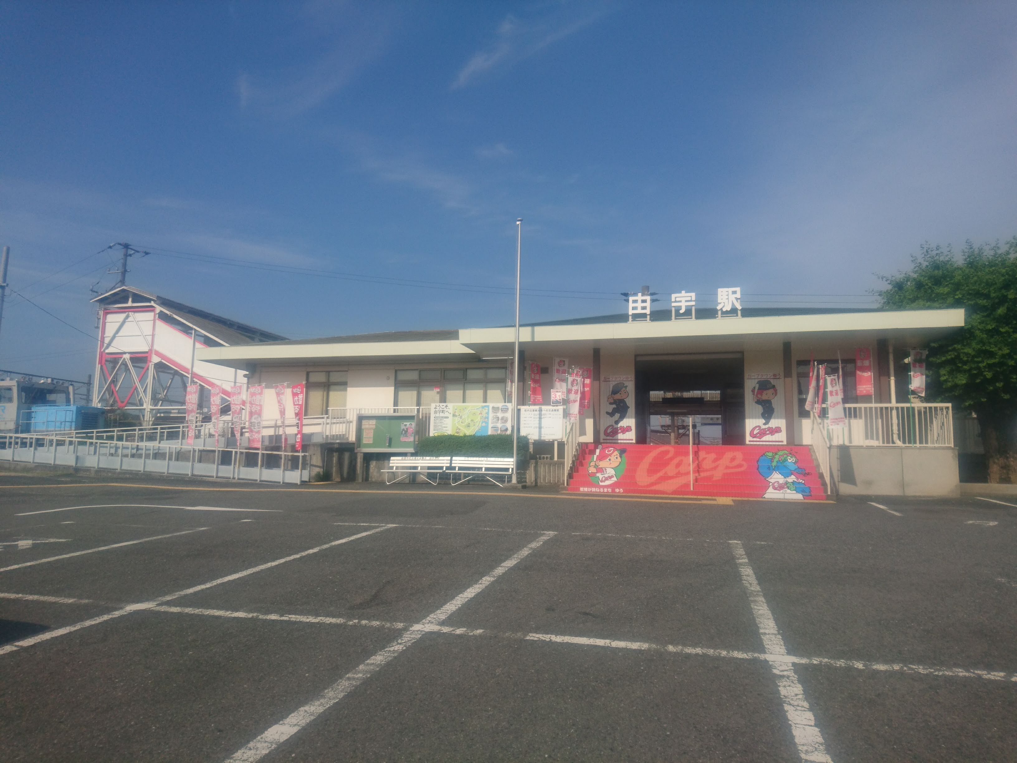 2018年6月時点での由宇駅外観